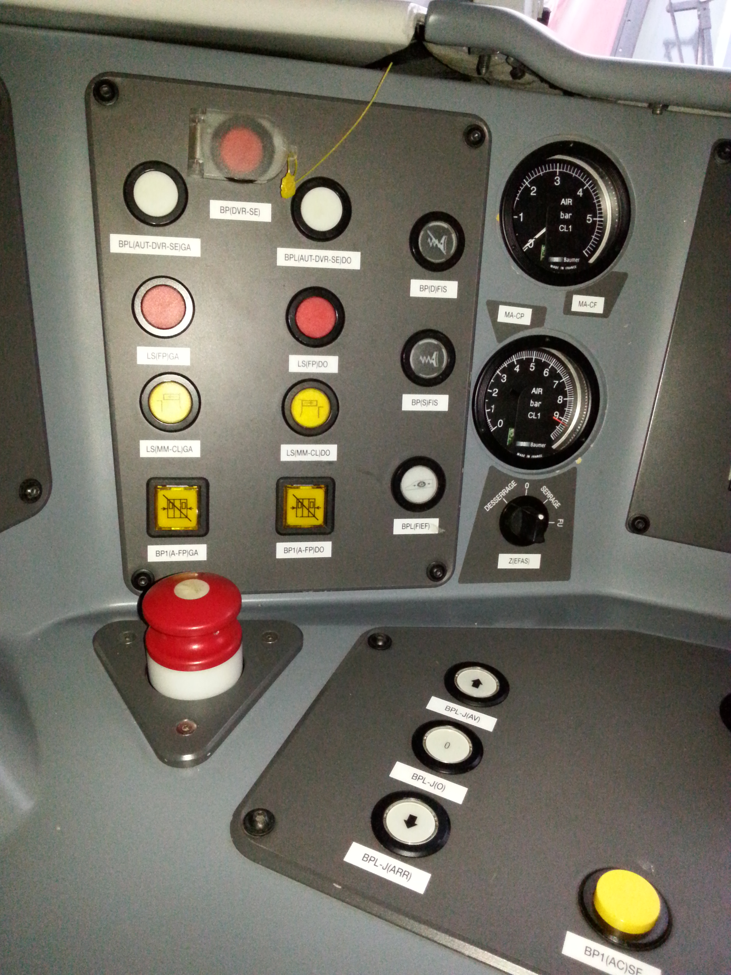 Zoom sur les boutons situés à gauche du conducteur, sur un Z50000.